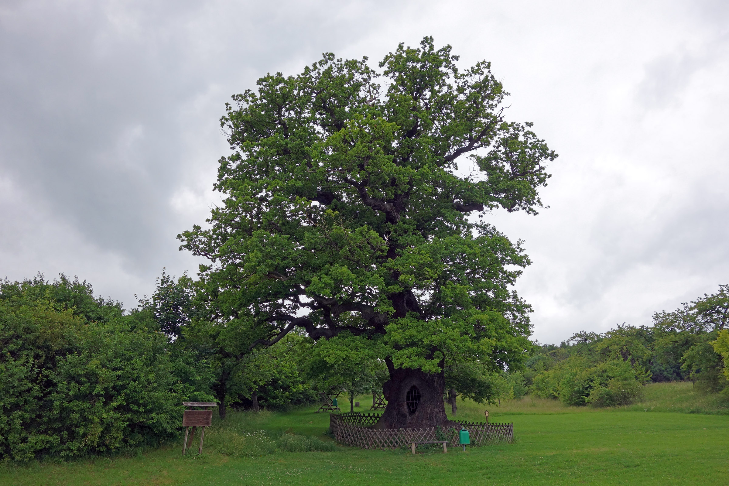 Königseiche Volkenroda